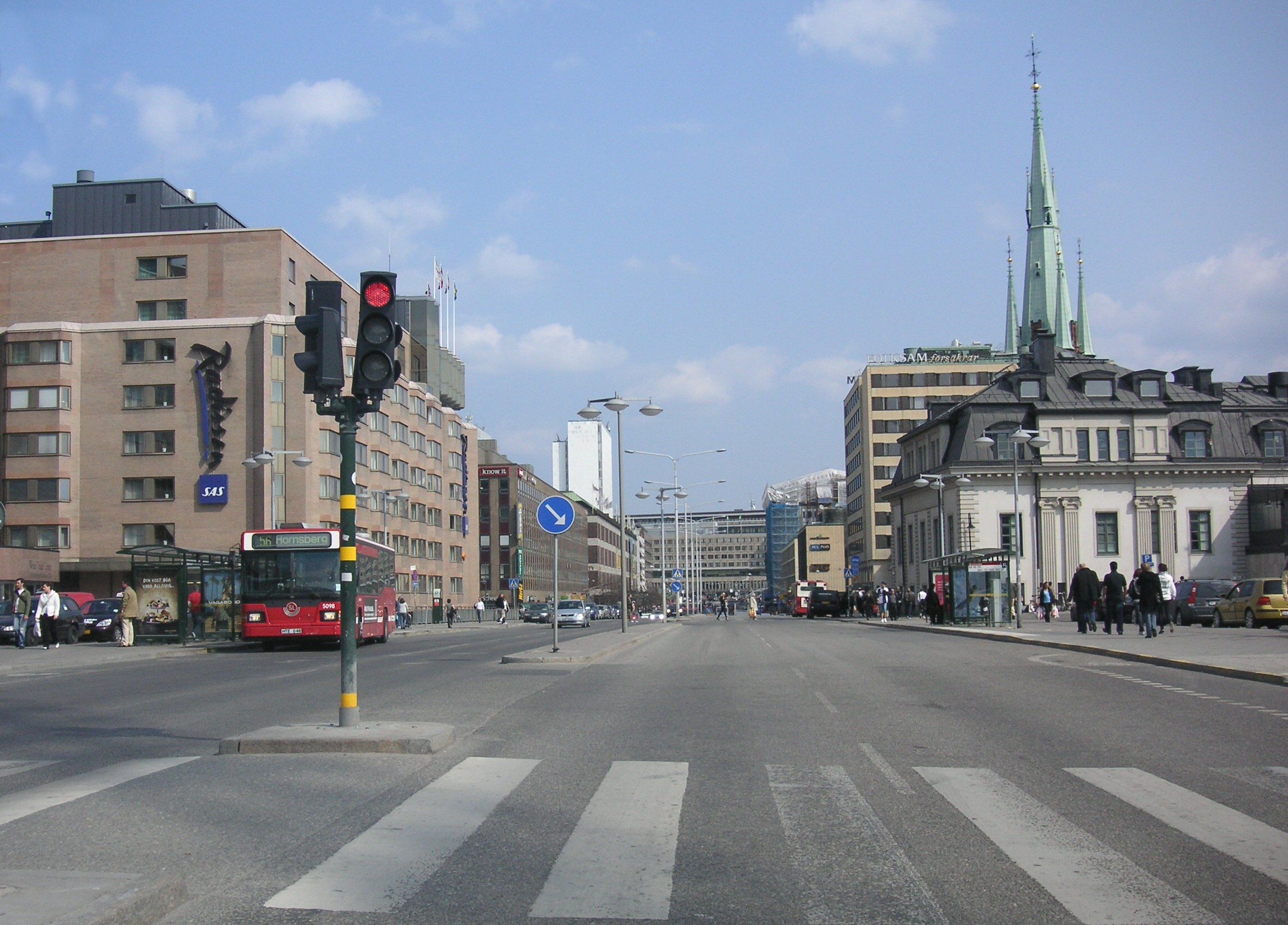 Klarabergsgatan i Stockholm, vy mot öst i höjd med Centralstationen